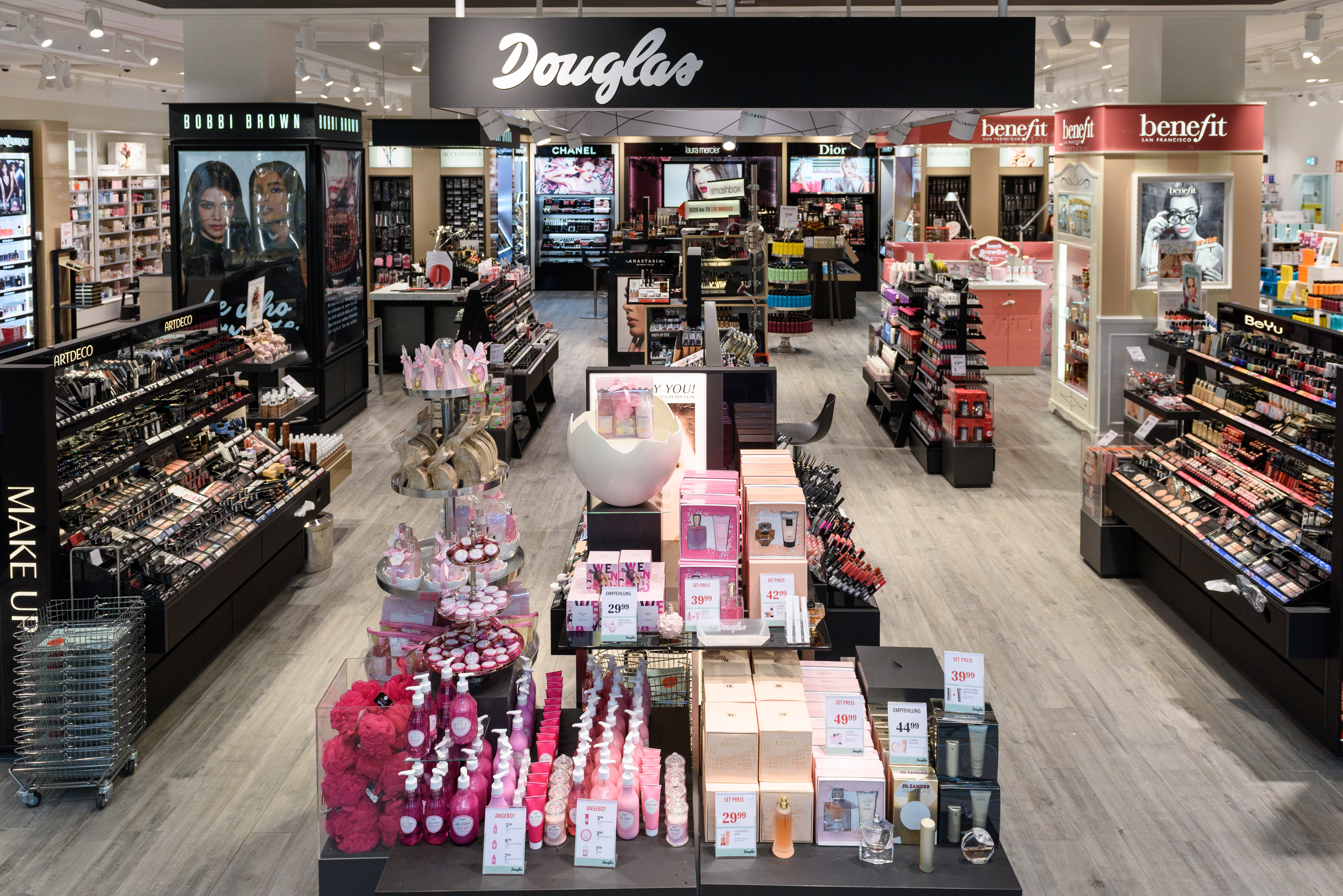 Innenansicht einer Douglas Filiale